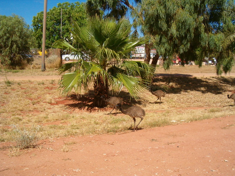 autor: michal nebo zuzka (vlastní fotografie)